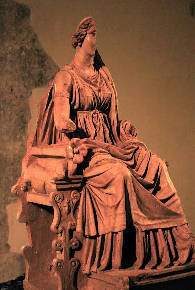 Supposta statua in terracotta della dea Angizia (Museo d'arte sacra della Marsica)